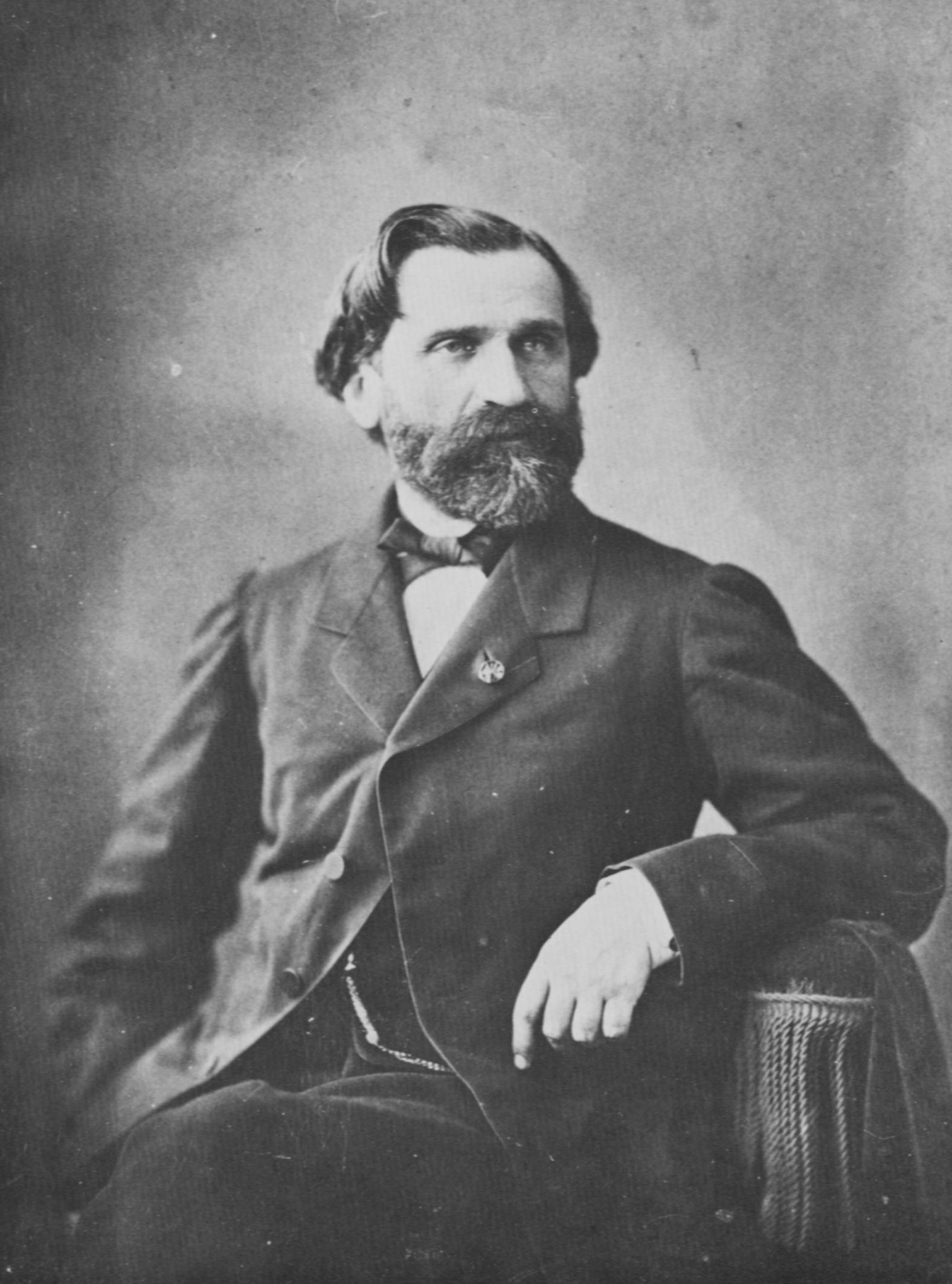 Tournachon, Gaspard-Félix: Giuseppe Verdi (1813-1901)